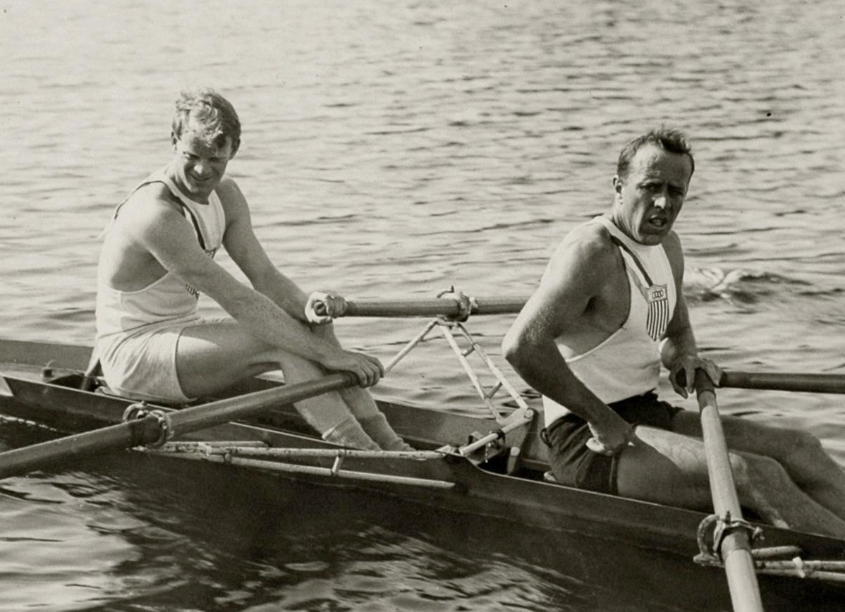 Sport, Olympische Spelen Amsterdam 1928, Roeien: Opname de Amerikanen links op boeg Paul Costello en Charles McIlvaine winnaars van de gouden medaille in het onderdeel Dubbel Twee